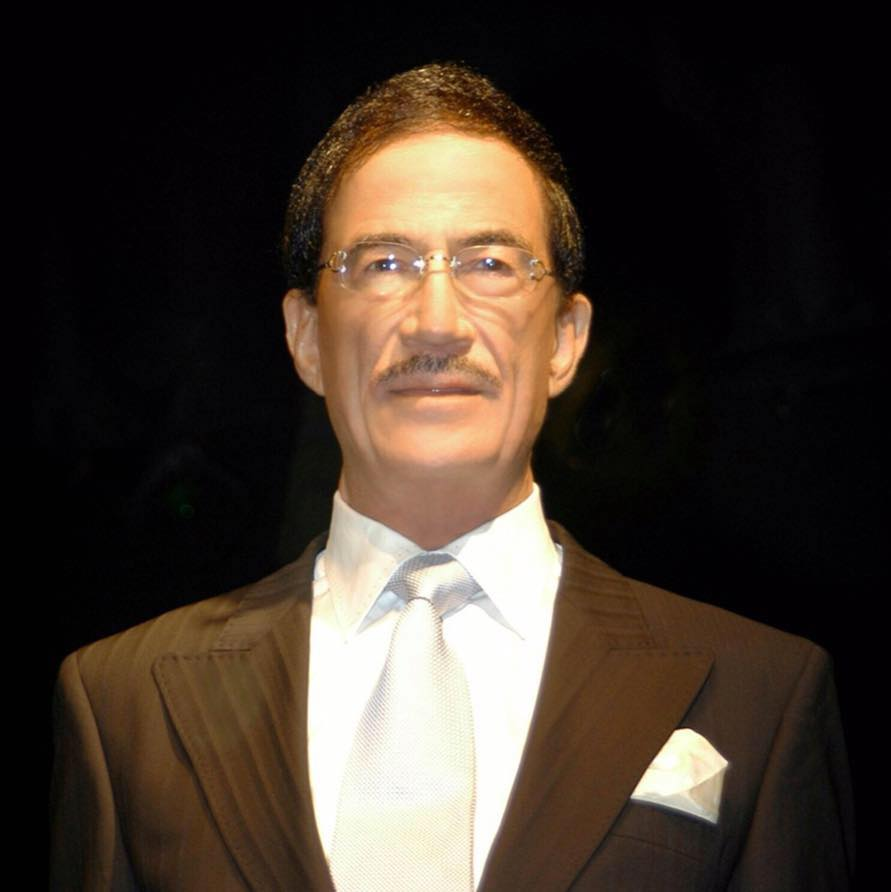 Memduh Erdal 2015